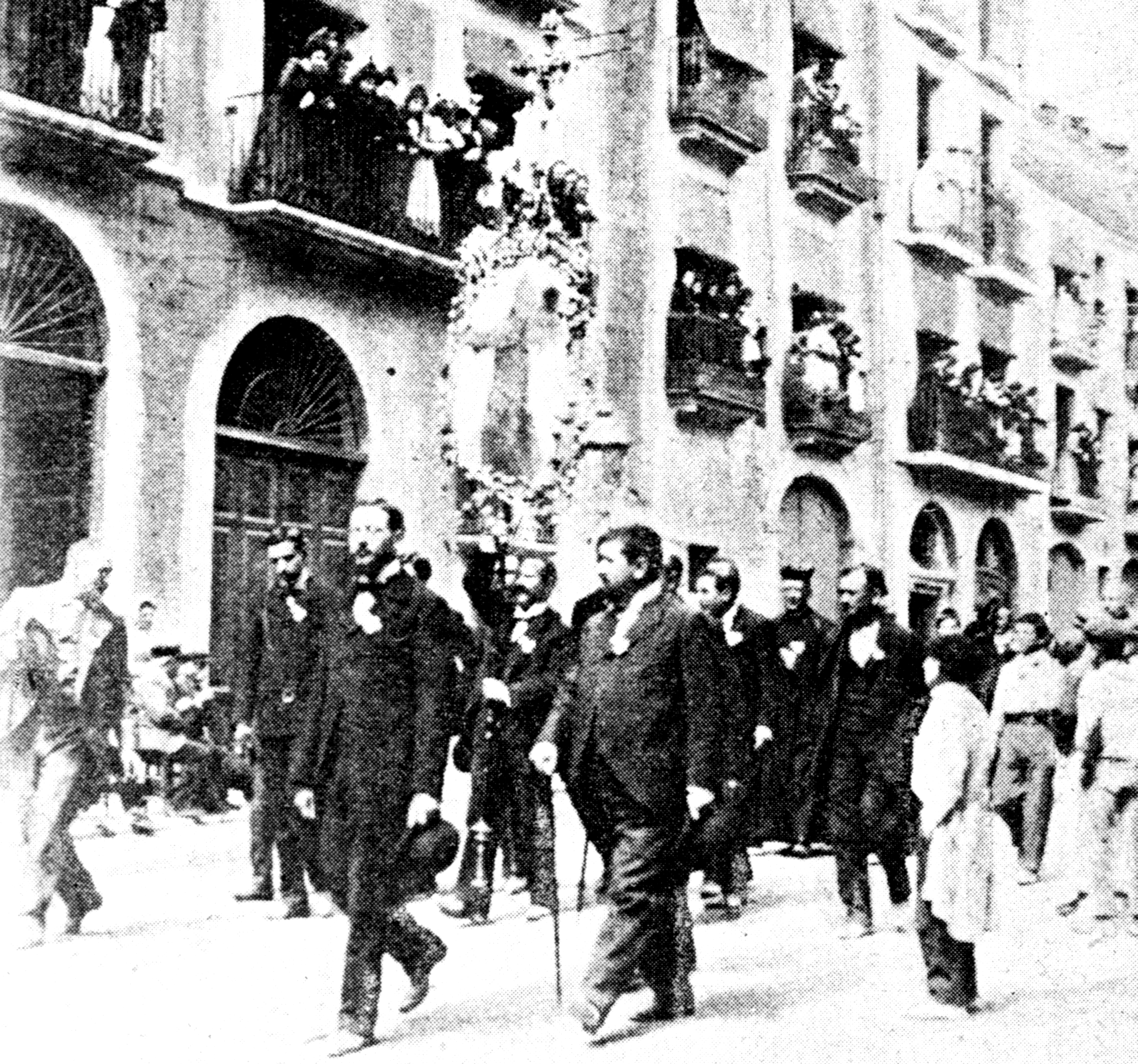 La procesión de los reusences residentes en Barcelona al Santuario de la Misericordia de Reus. En el centro se ve el estandarte diseñado por Gaudí y a la izquierda el mismo arquitecto formando parte de la peregrinación. Semanario Católico de Reus. 21 de abril de 1900..Foto de A. Anguera.